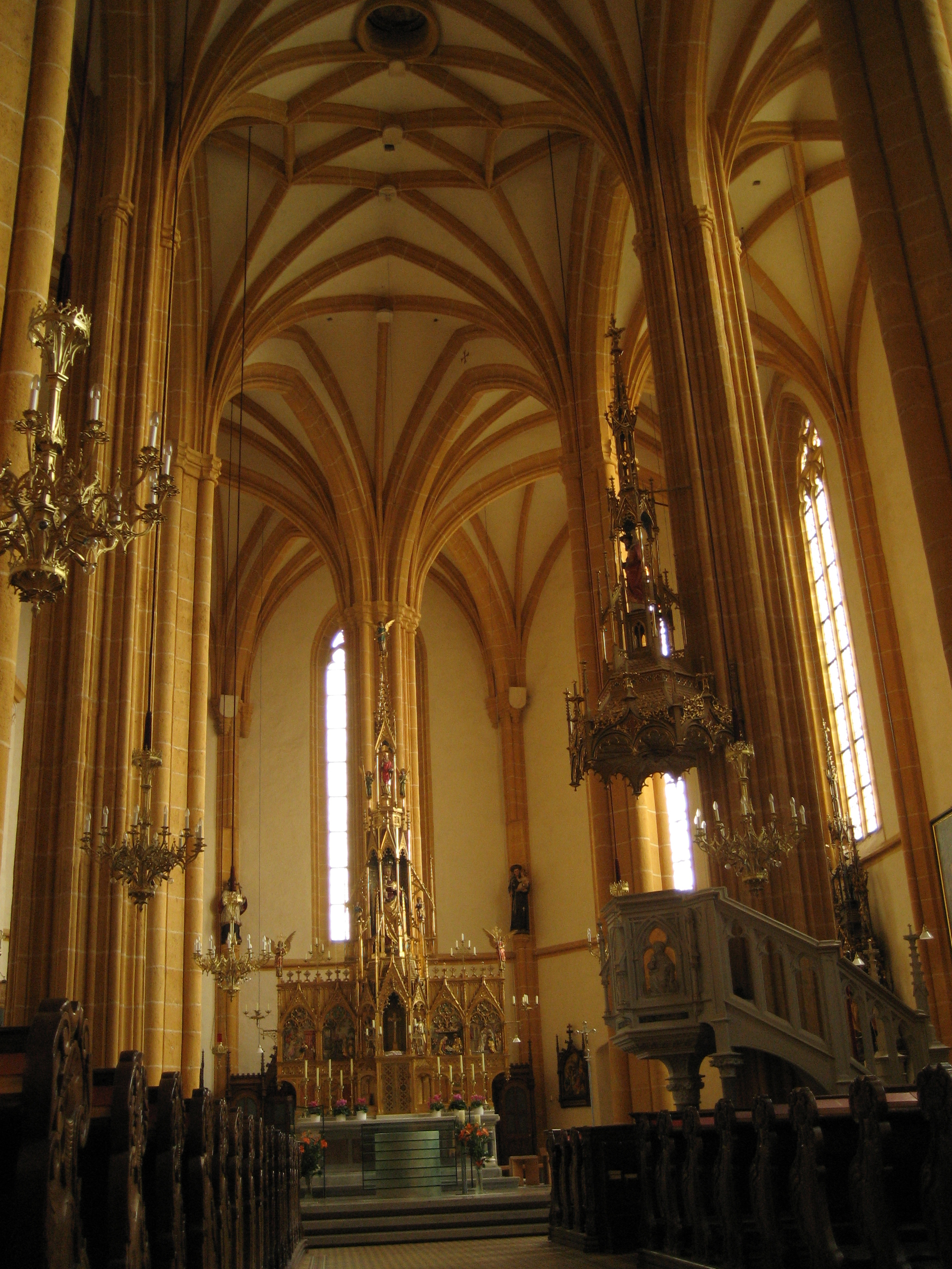 Wallfahrtskirche Maria Trost in Fernitz, Steiermark, Österreich / Church Maria Trost in Fernitz, Styria, Austria